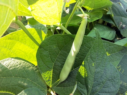 콩깍지